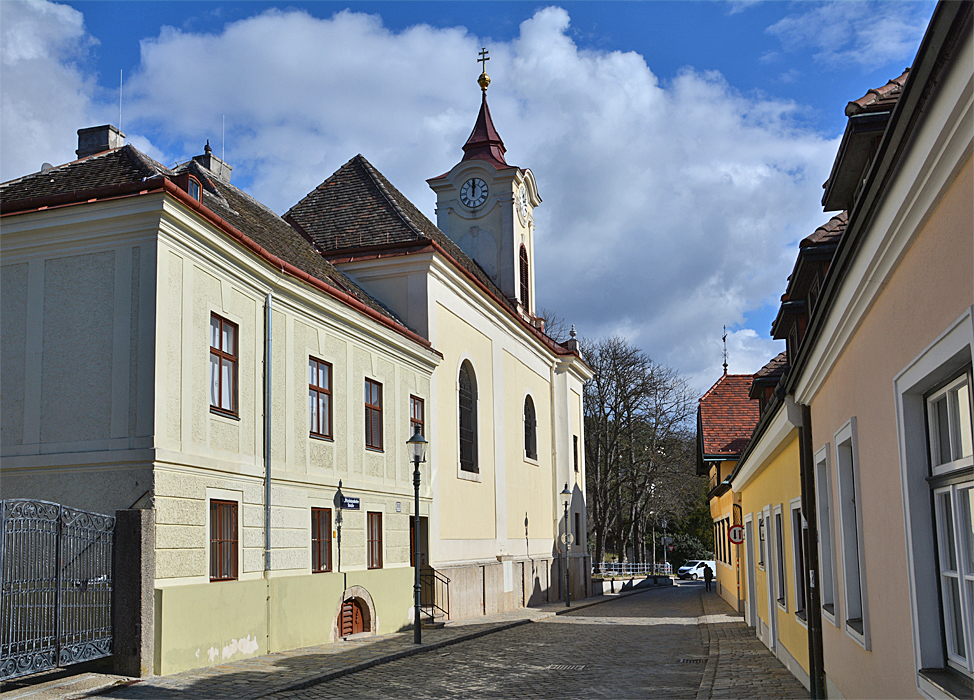 Im Dorfzentrum von Pötzleinsdorf mit der Aegidiuskirche